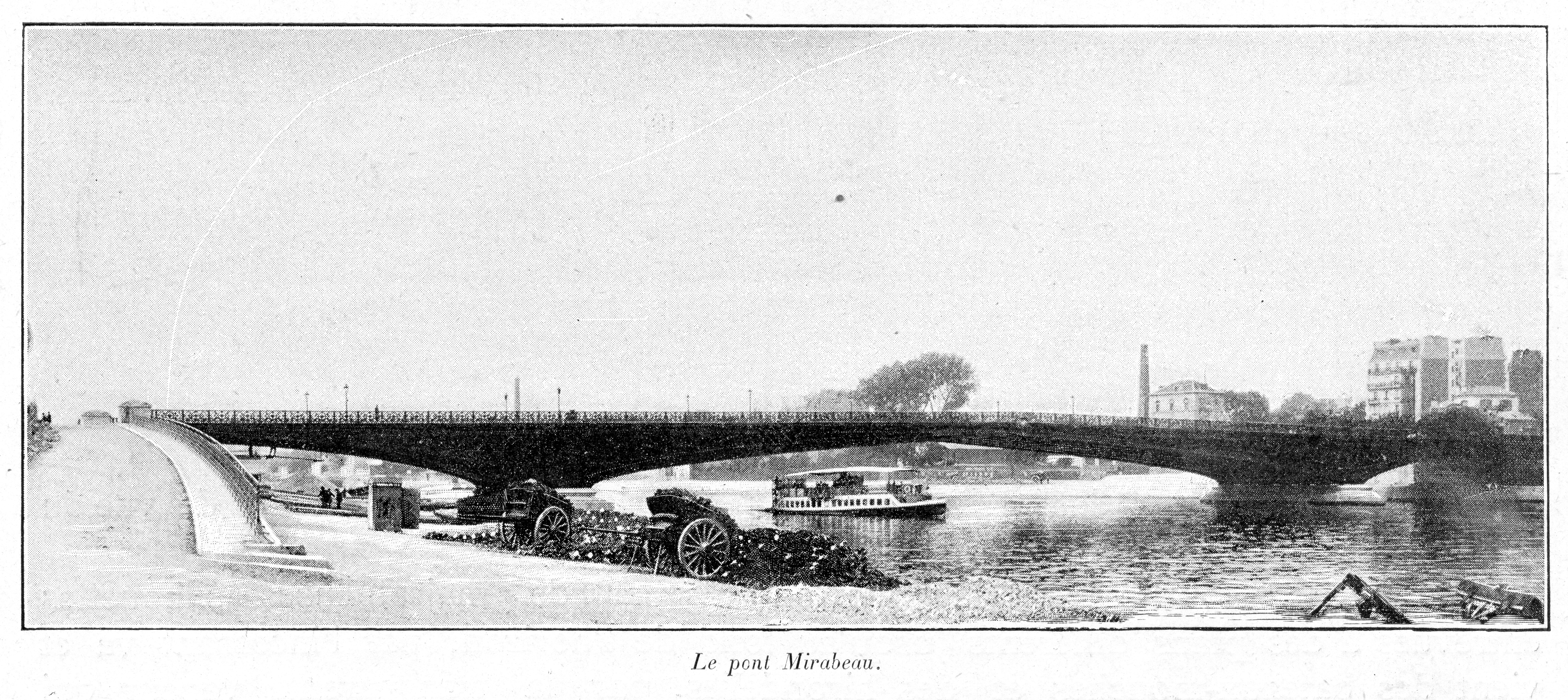 Clément Maurice Paris en plein air, BUC, 1897,Le Pont Mirabeau